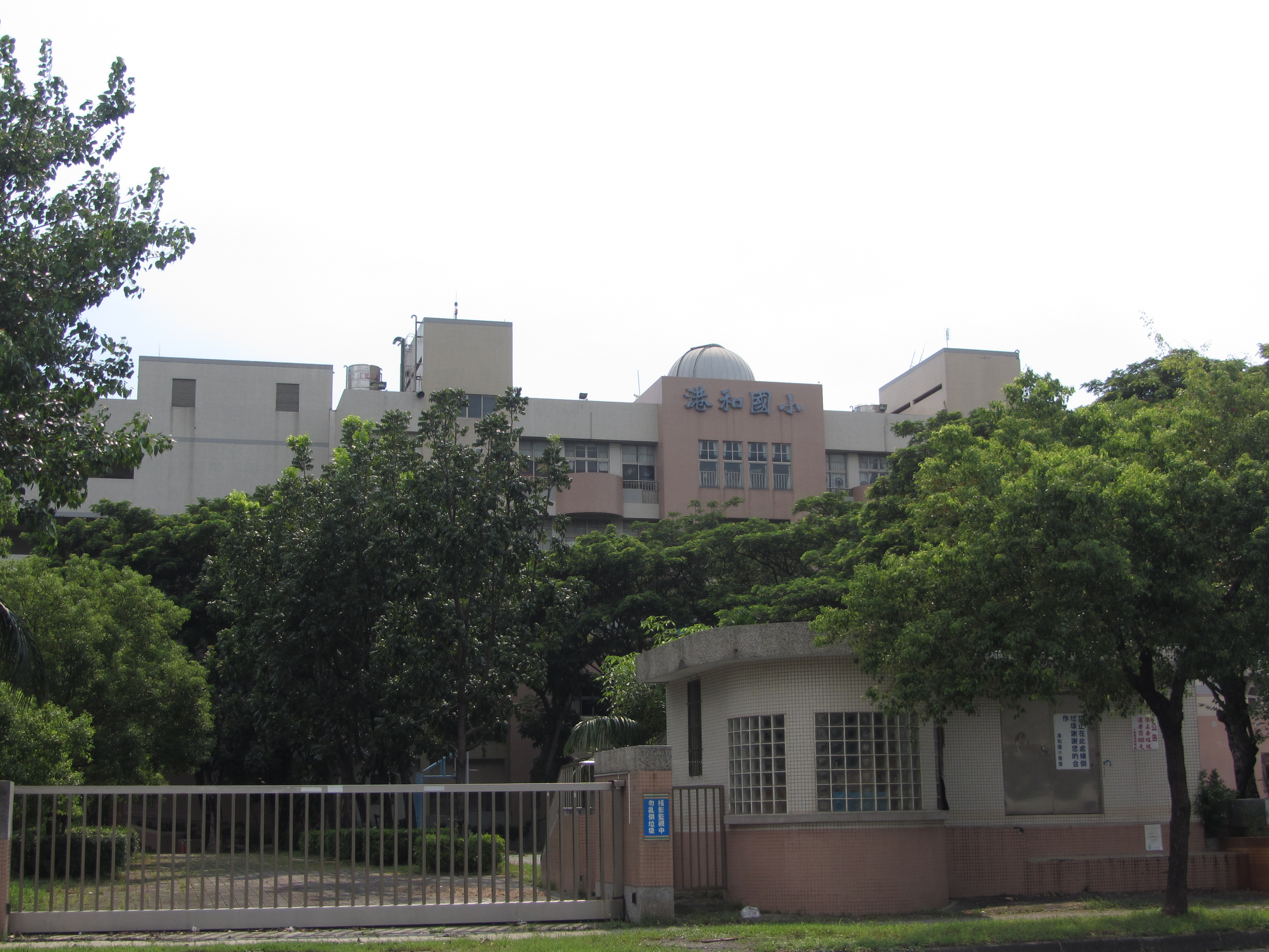 高雄市小港區港和國民小學天文館。